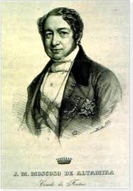 Retrato del aristócrata y político español José María Moscoso de Altamira (1788-1855), primer conde de Fontao. Durante el reinado de Isabel II de España llegó a ser ministro de Gobernación de la Península y de Fomento General del Reino y también presidente de las Cortes y primer presidente del Senado.